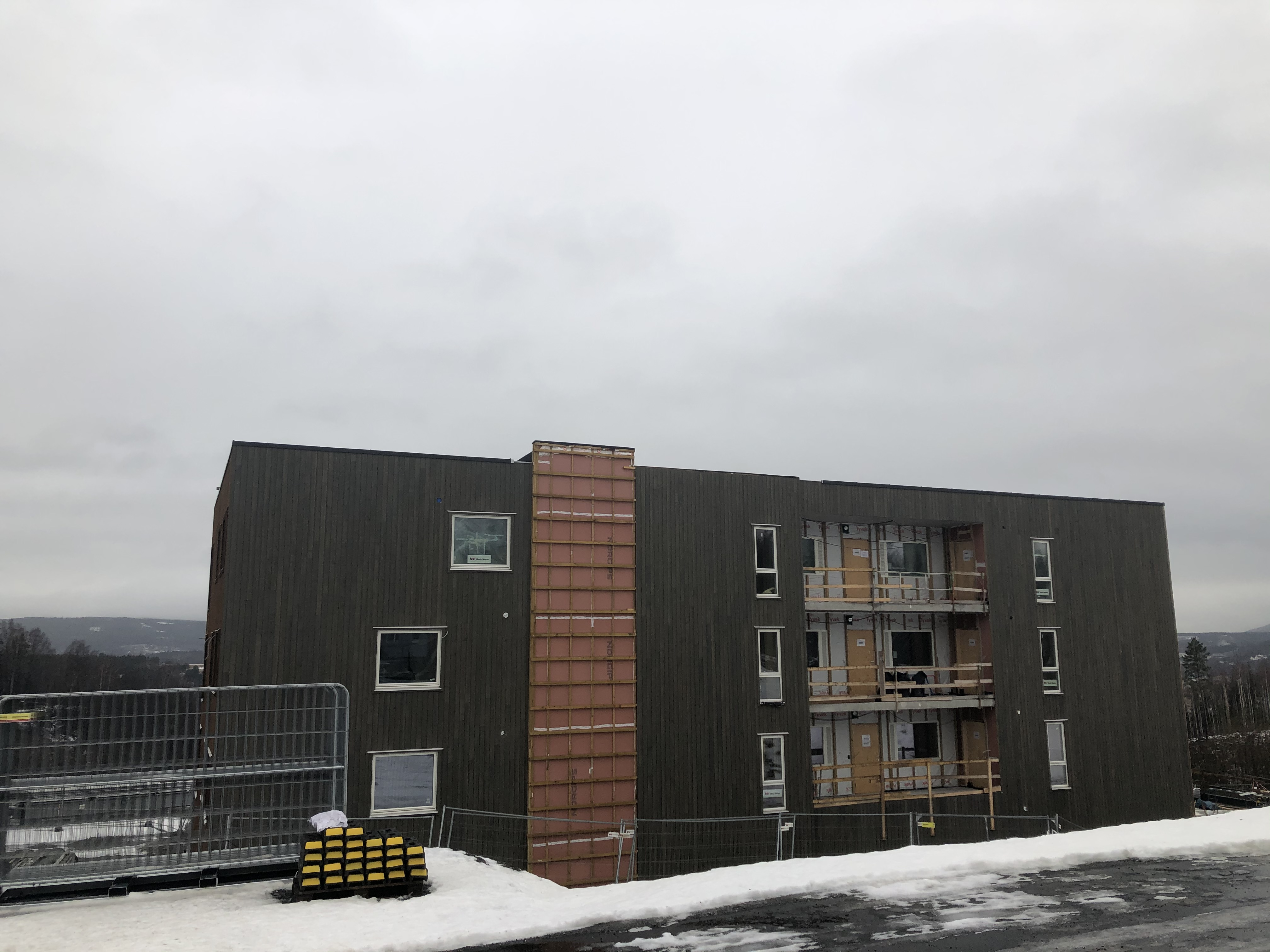 Tanberglia 51, Hønefoss